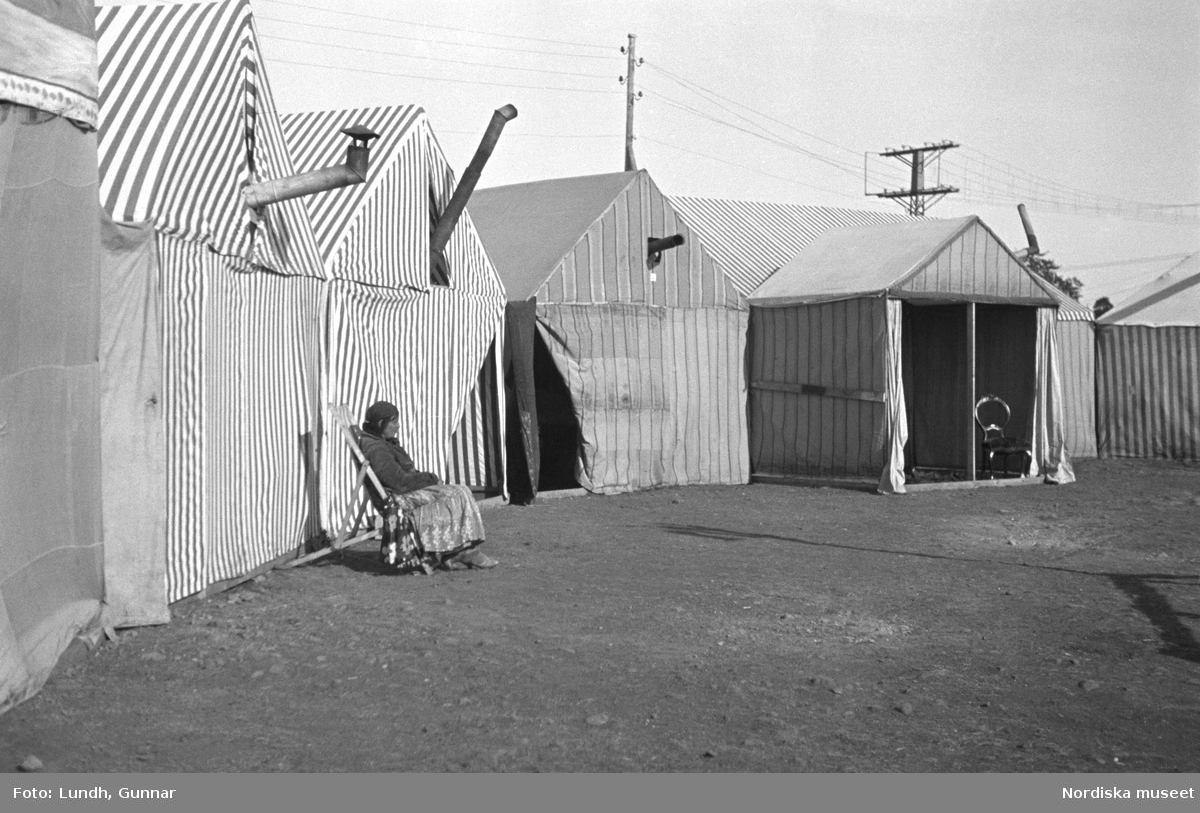 En ensam kvinna sitter i en stol framför en rad tält. Familjen Taikons läger i Johanneshov, södra Stockholm. NMA.0074098